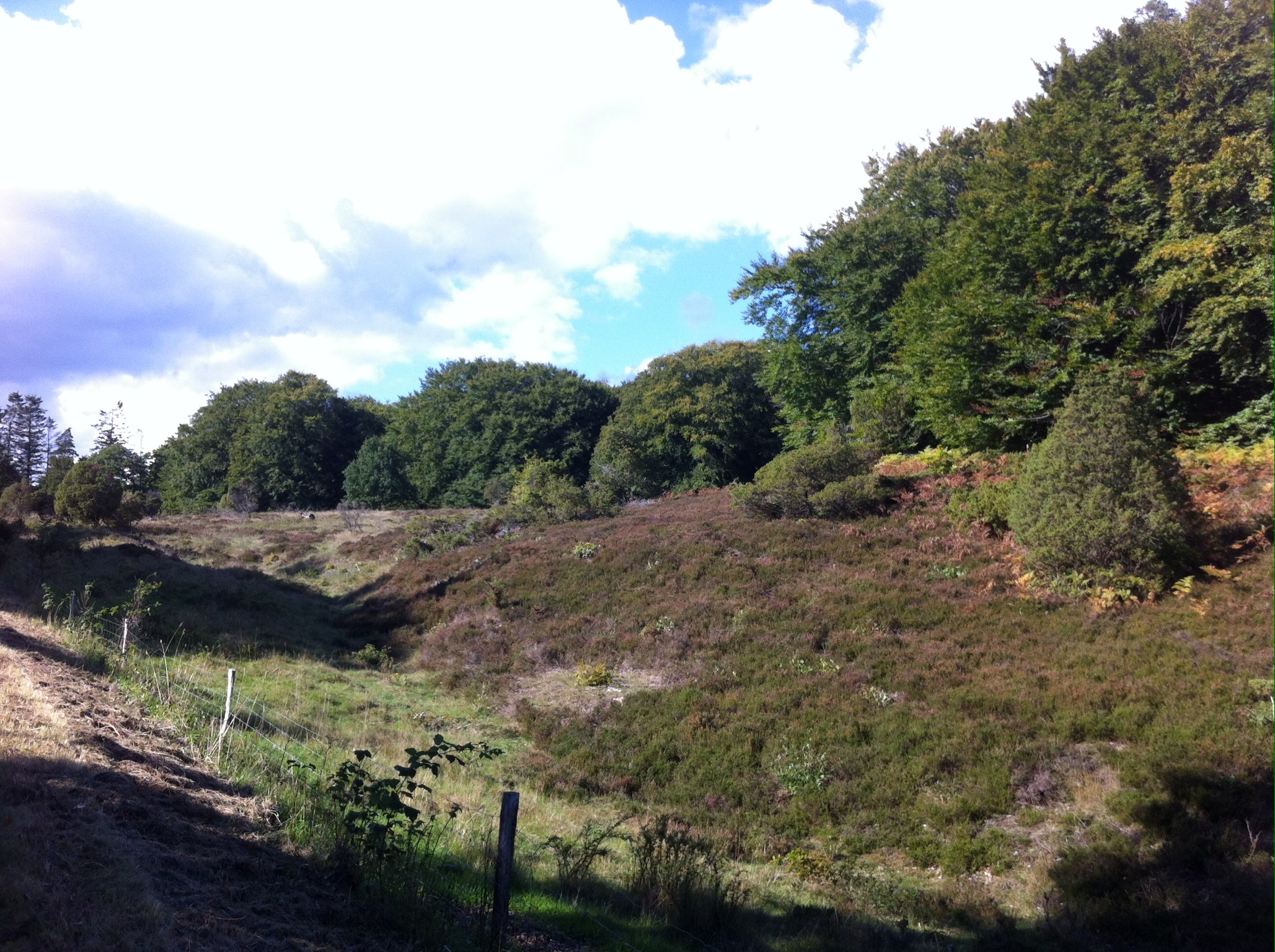 Linddalene ved Hadsund